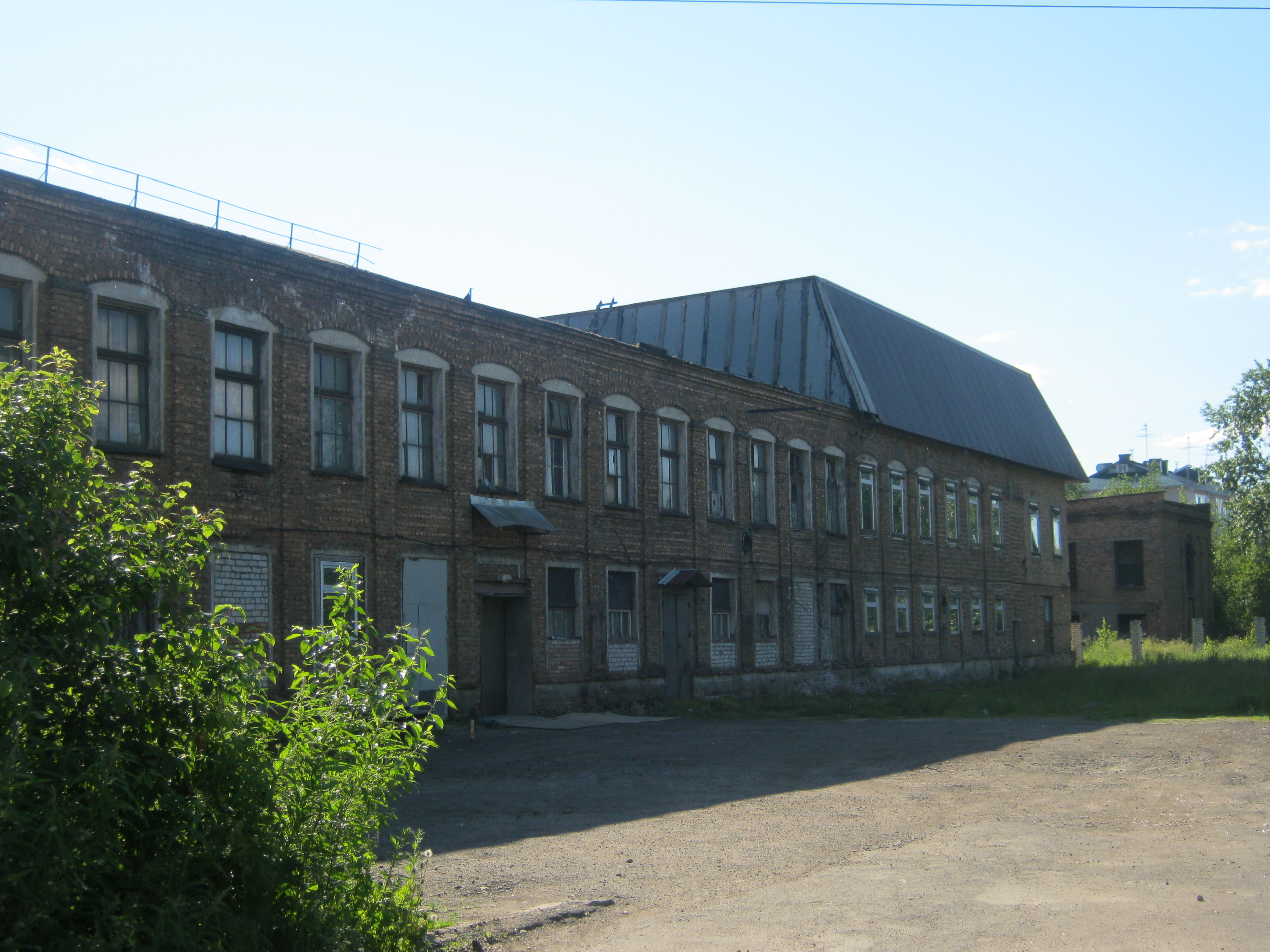 Промышленность Петрозаводска